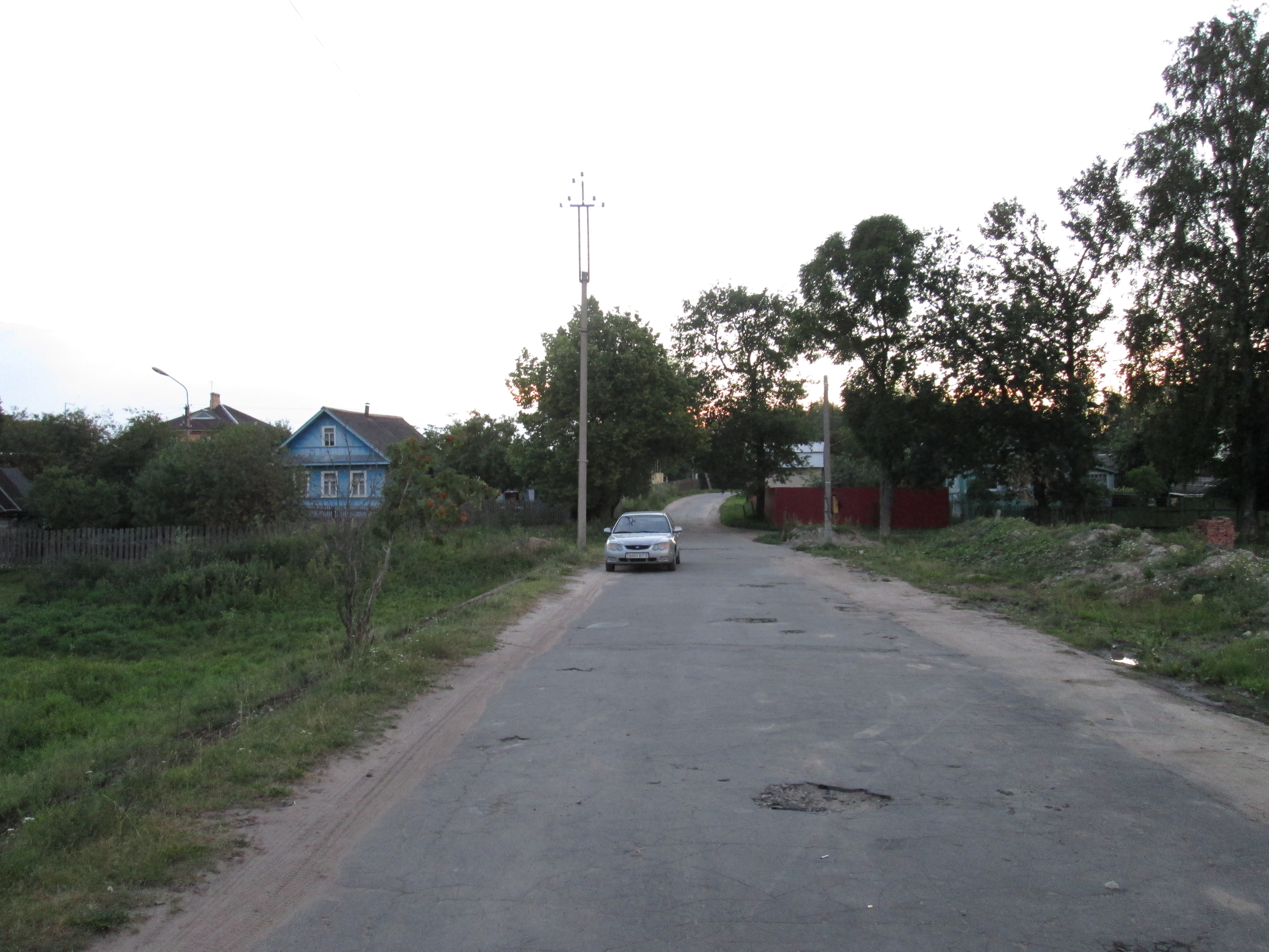 Деревня Юрьево Новгородского района Новгородской области России. Окраина деревни, расположенная ближе к Перынскому скиту